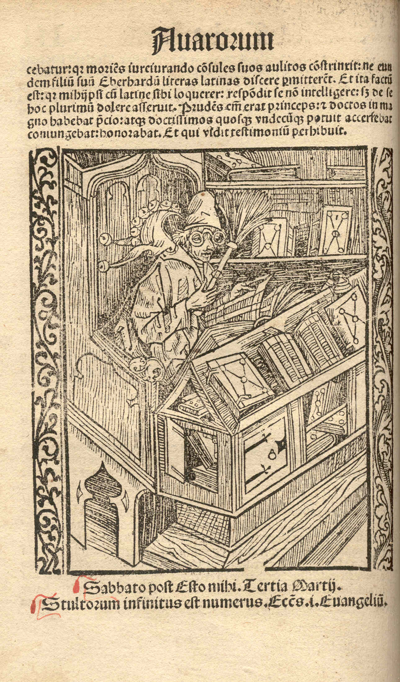 Johannes Geiler von Kaysersberg: Navicula sive Speculum fatuorum. Straßburg, (sog. Postinkunabel oder Frühdruck: Drucke nach dem 31. Dezember 1500)